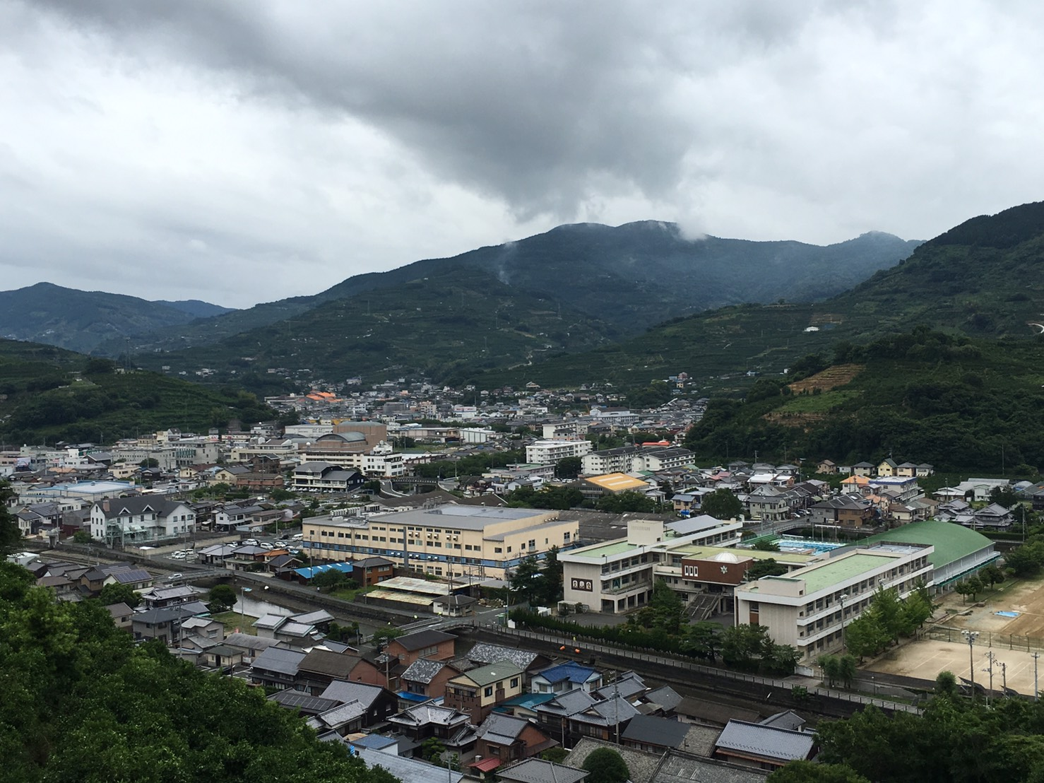 保内町川之石の琴平(こんぴら) 神社から保内町を一望